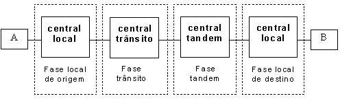 Sistema de TelecomunicaÃ§Ãµes: esquema de interligaÃ§Ã£o de centrais telefÃ´nicas.